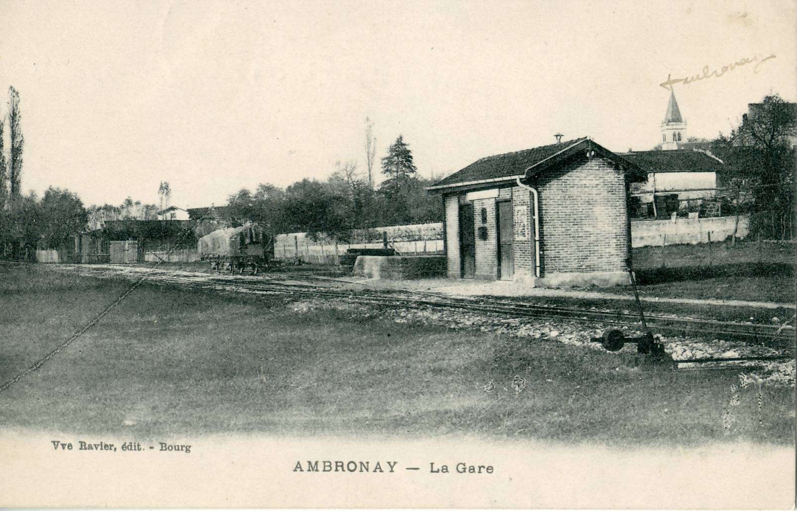 Carte postale ancienne éditée par Ravier à Bourg AMBRONAY - La Gare